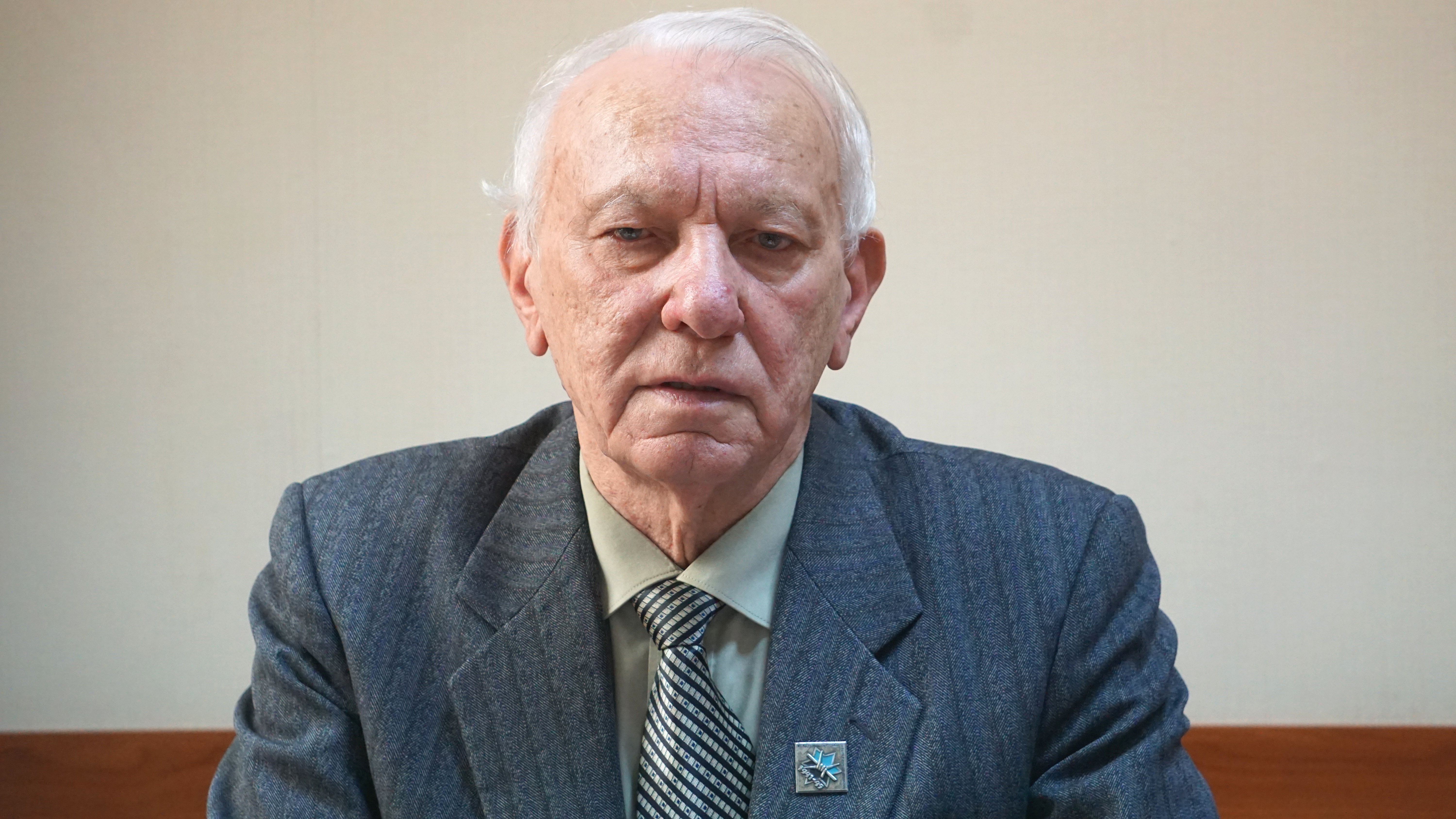 Шварцман, Роман Маркович. Кабинет